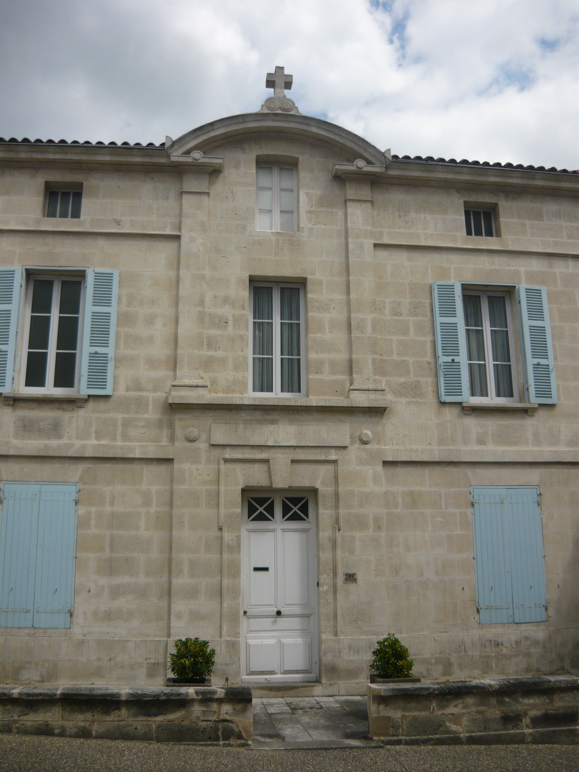 maison presbytérale face à l'église saint-Étienne de Tonnay-Charente